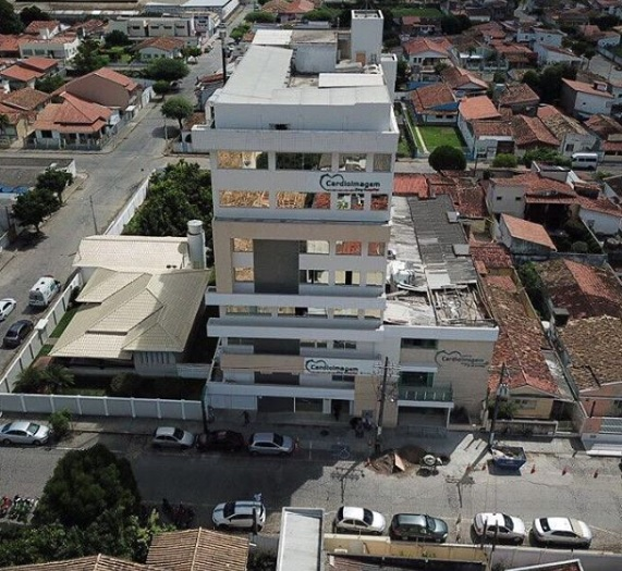 Cruz das Almas